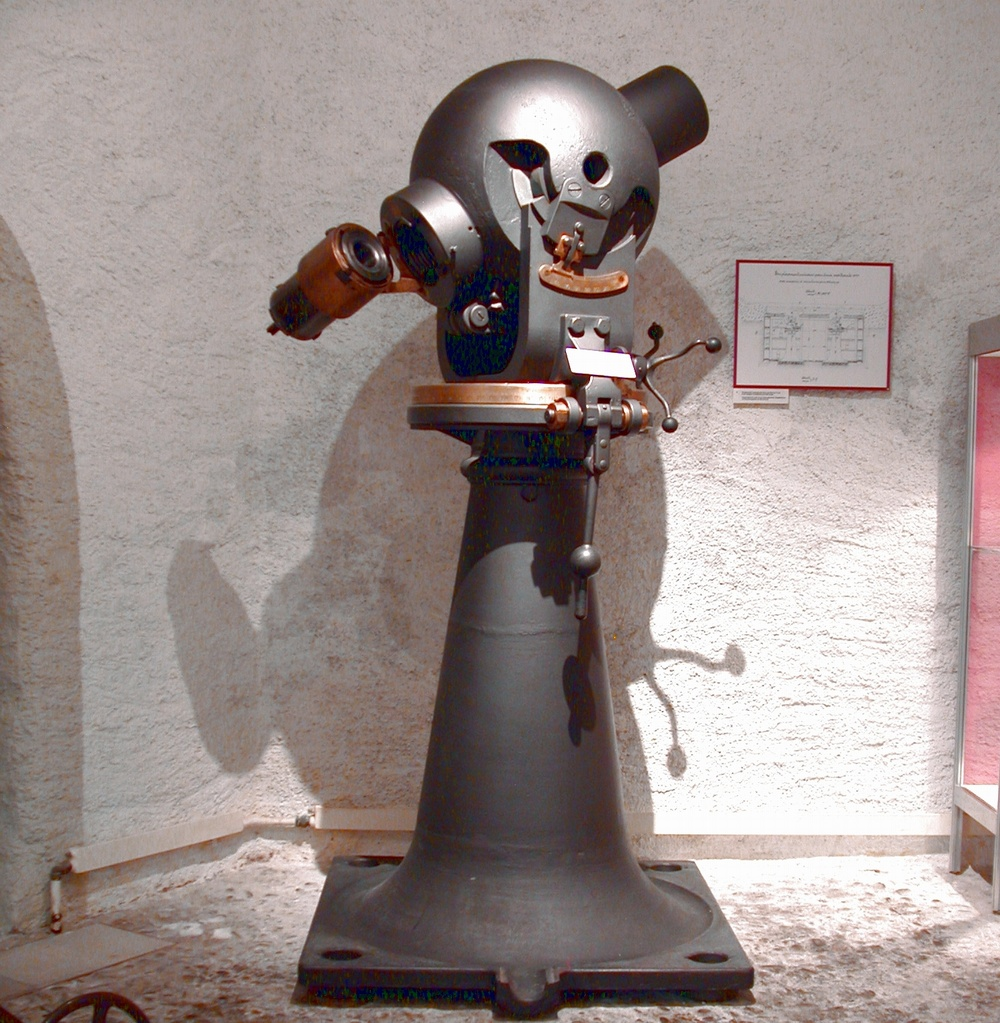 12 cm Kugelmörser Schweiz Ord 1888, Grusonwerke Magdeburg, Standort Musée Militaire Vaudois, 1110 Morges, Schweiz